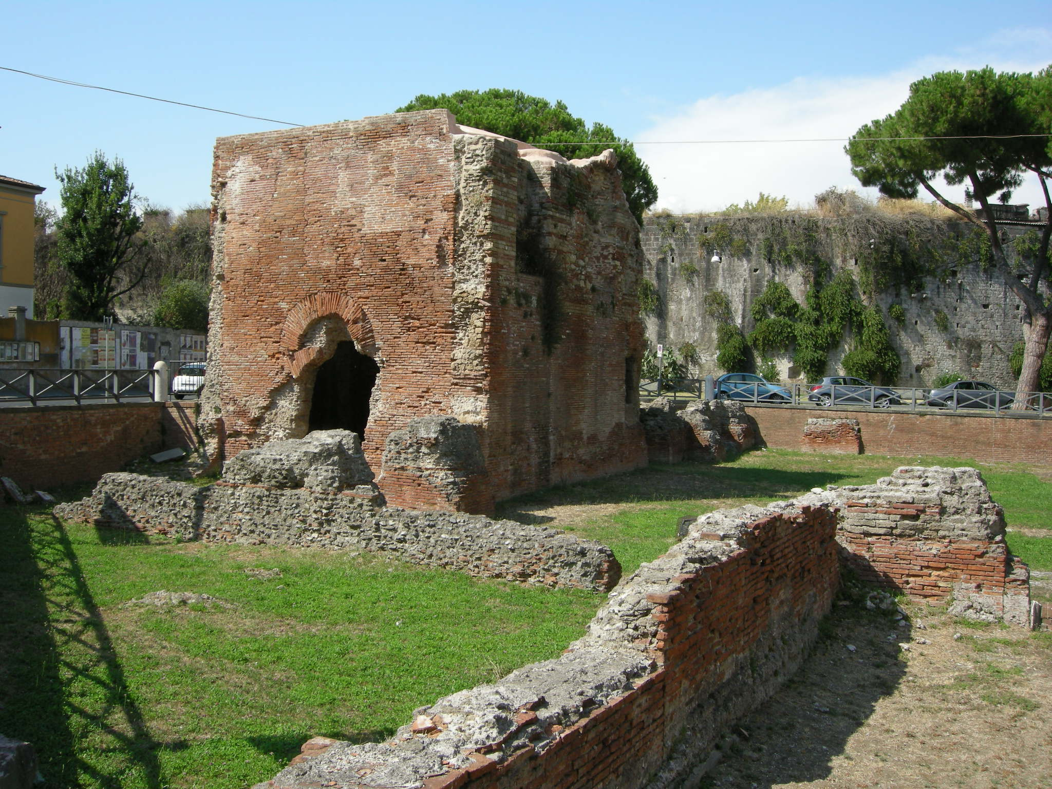 Bagni di nerone, pisa